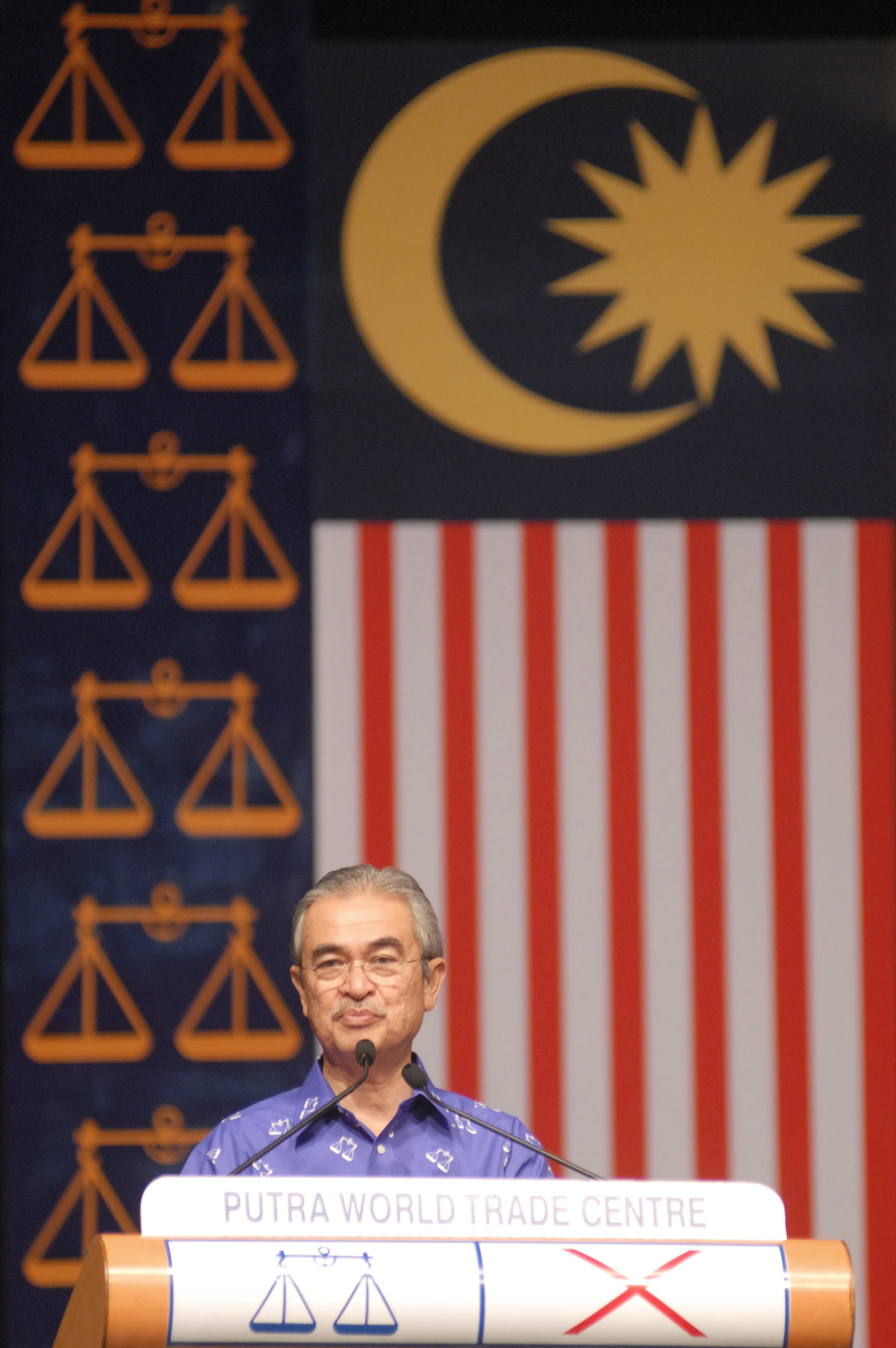 Datuk Seri Abdullah Ahmad Badawi memberikan ucapan Ketika Majlis Pelancaran Jentera Barisan Nasional di PWTC Kuala Lumpur.